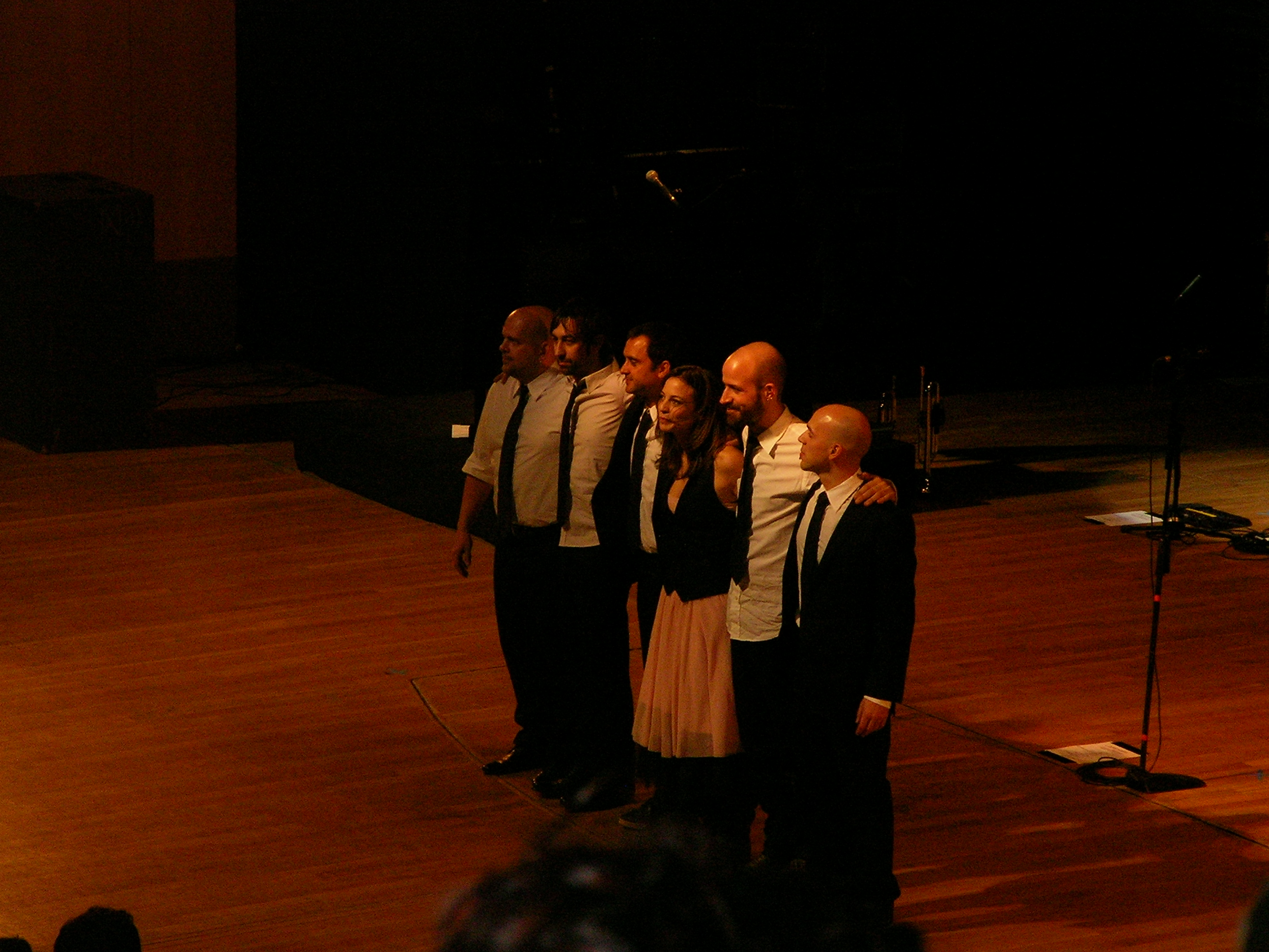 Concierto de Marlango en el Auditorio Víctor Villegas de Murcia